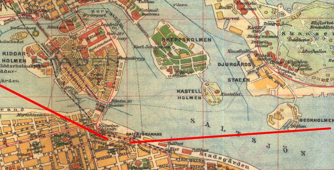 Vy över Saltsjön, Stockholm